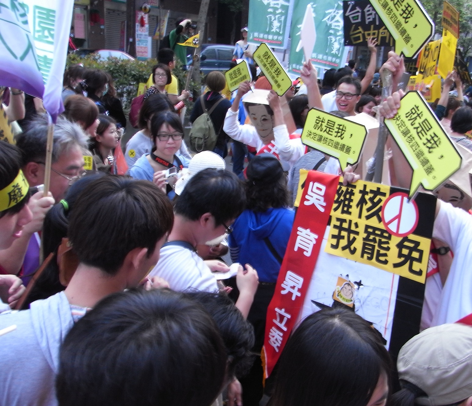 2013.3.9反核行動劇諷刺抨擊新北市中國國民黨立委吳育昇